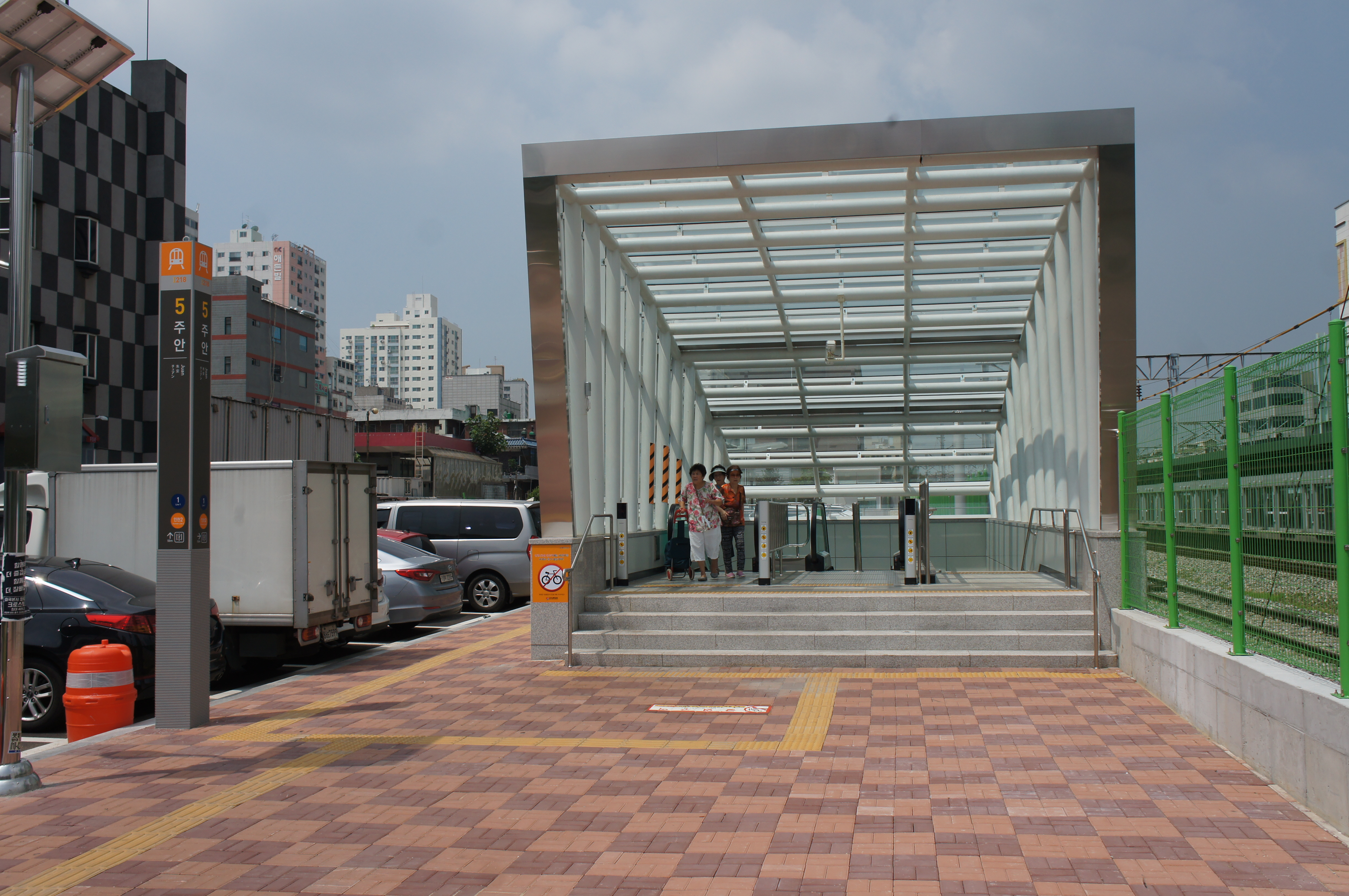 인천 2호선 주안역 5번 출구